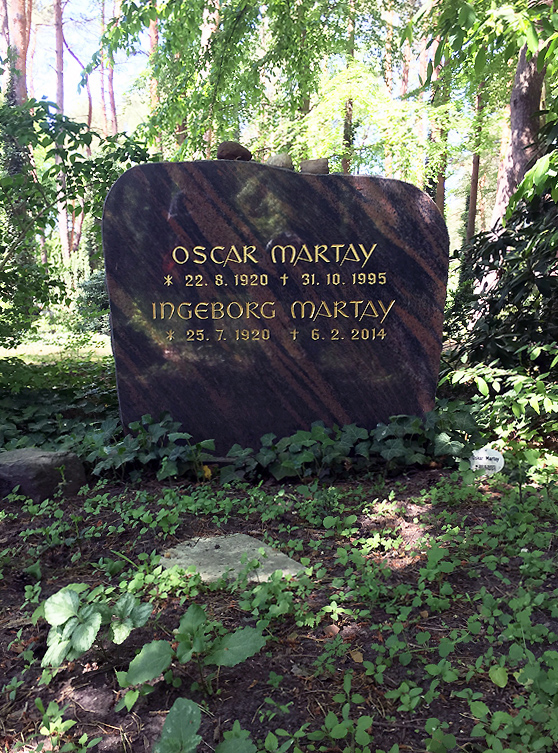 Grabstätte Oscar und Ingeborg Martay, Waldfriedhof Zehlendorf, Grabfeld 49, Wasgensteig 30, Berlin-Zehlendorf, 2018.